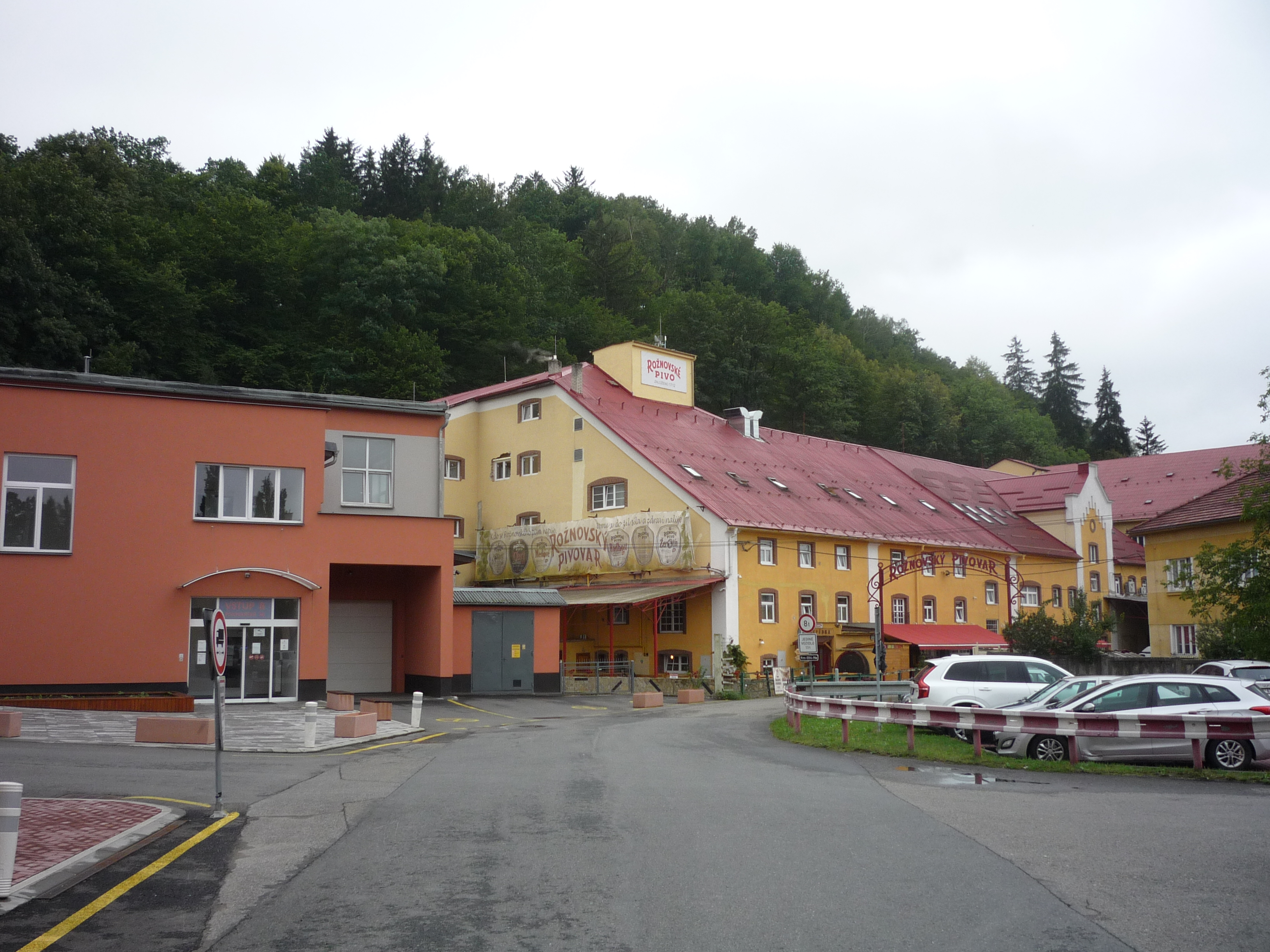 Autor fotografie Jiří Zelenka. Rožnovský pivovar.Rožnovský pivovar se nachází v prostorách původního pivovaru v Rožnově. Zde se vařilo pivo až do roku 1949, kdy byl pivovar uzavřen. Novodobá historie pivovaru se píše od července 2010, kdy zde začalo být opět vařeno pivo, tentokrát formou restauračního pivovárku. V obrovském komplexu budov pivovaru můžete kromě restaurace navštívit také pivní lázně a k nim přidruženou kavárnu. Prostory restaurace nejsou nijak velké. Uvnitř je několik stolků a také měděná varna. Rožnov pod Radhoštěm Pivovarská 6. Okr. Vsetín. Zlínský kraj. Czech Republic.